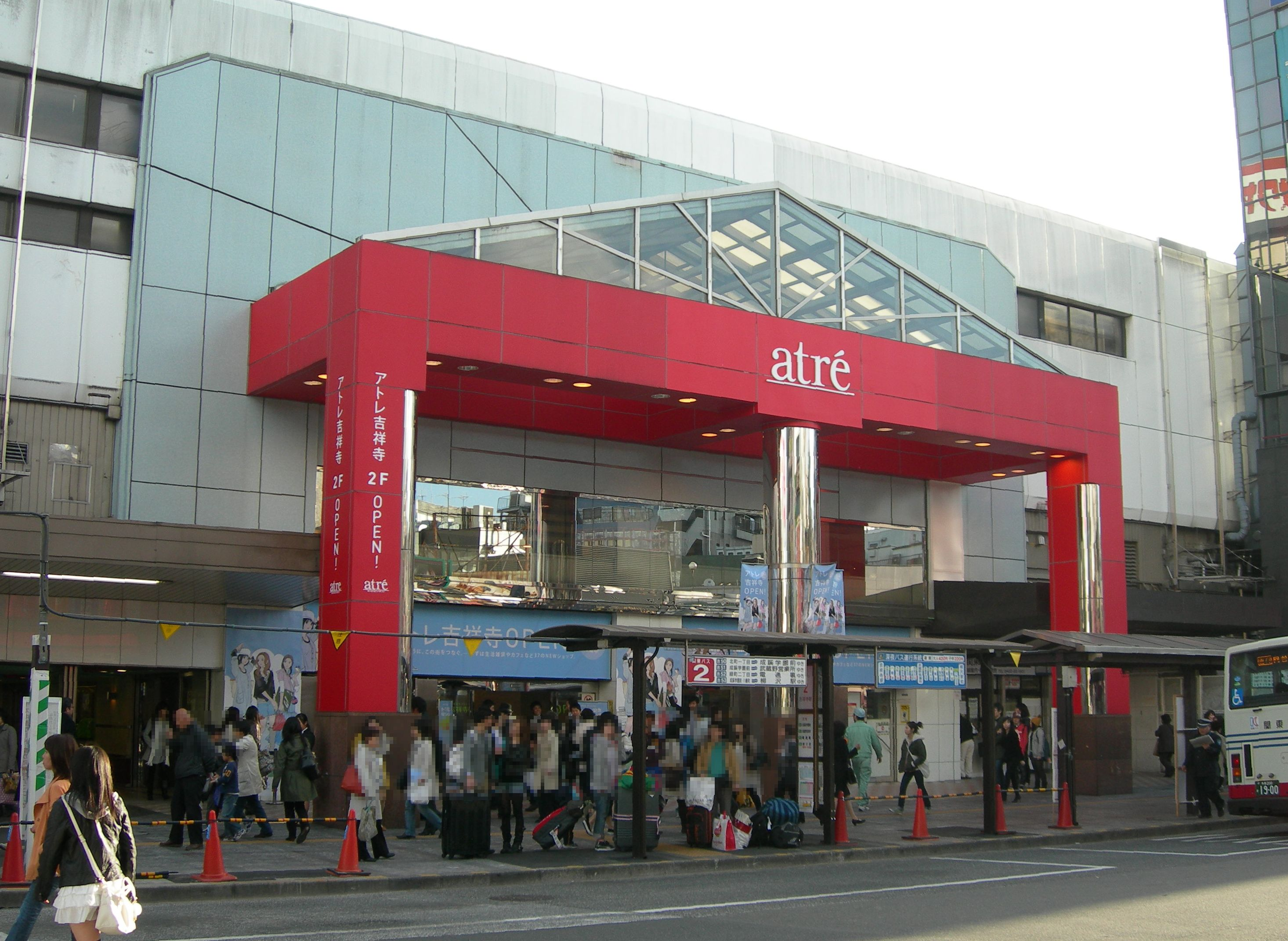 アトレ吉祥寺